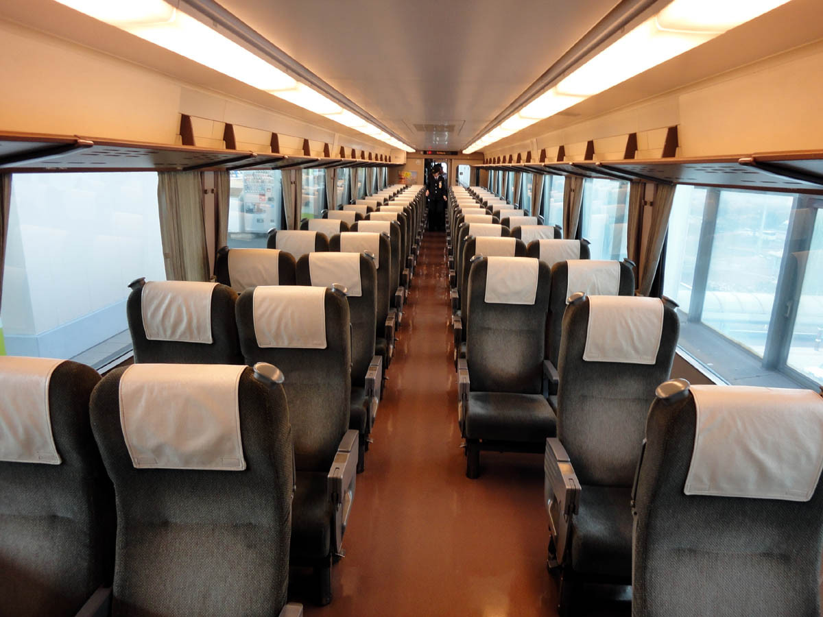 JR西日本キハ187系車内